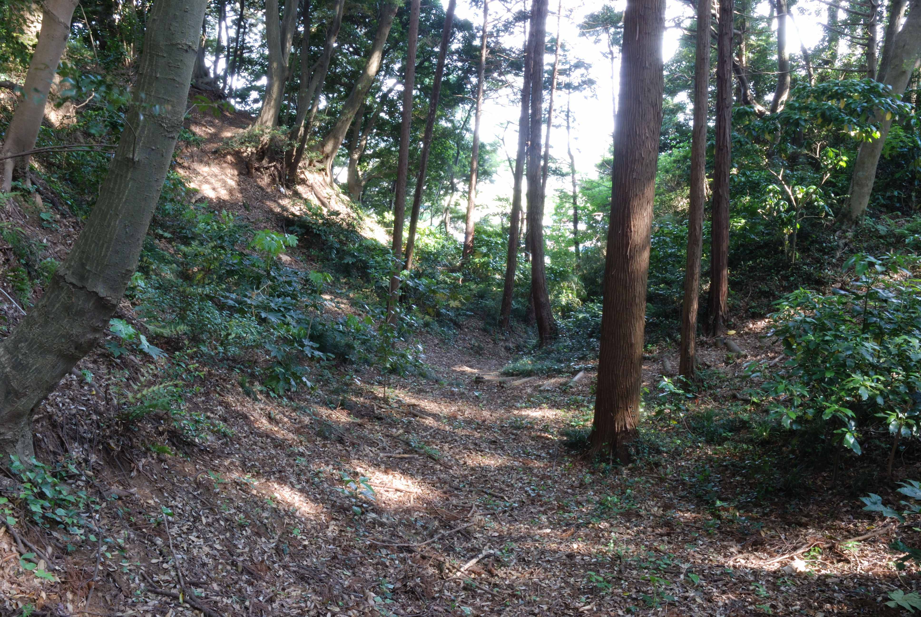 Ichikaku karabori